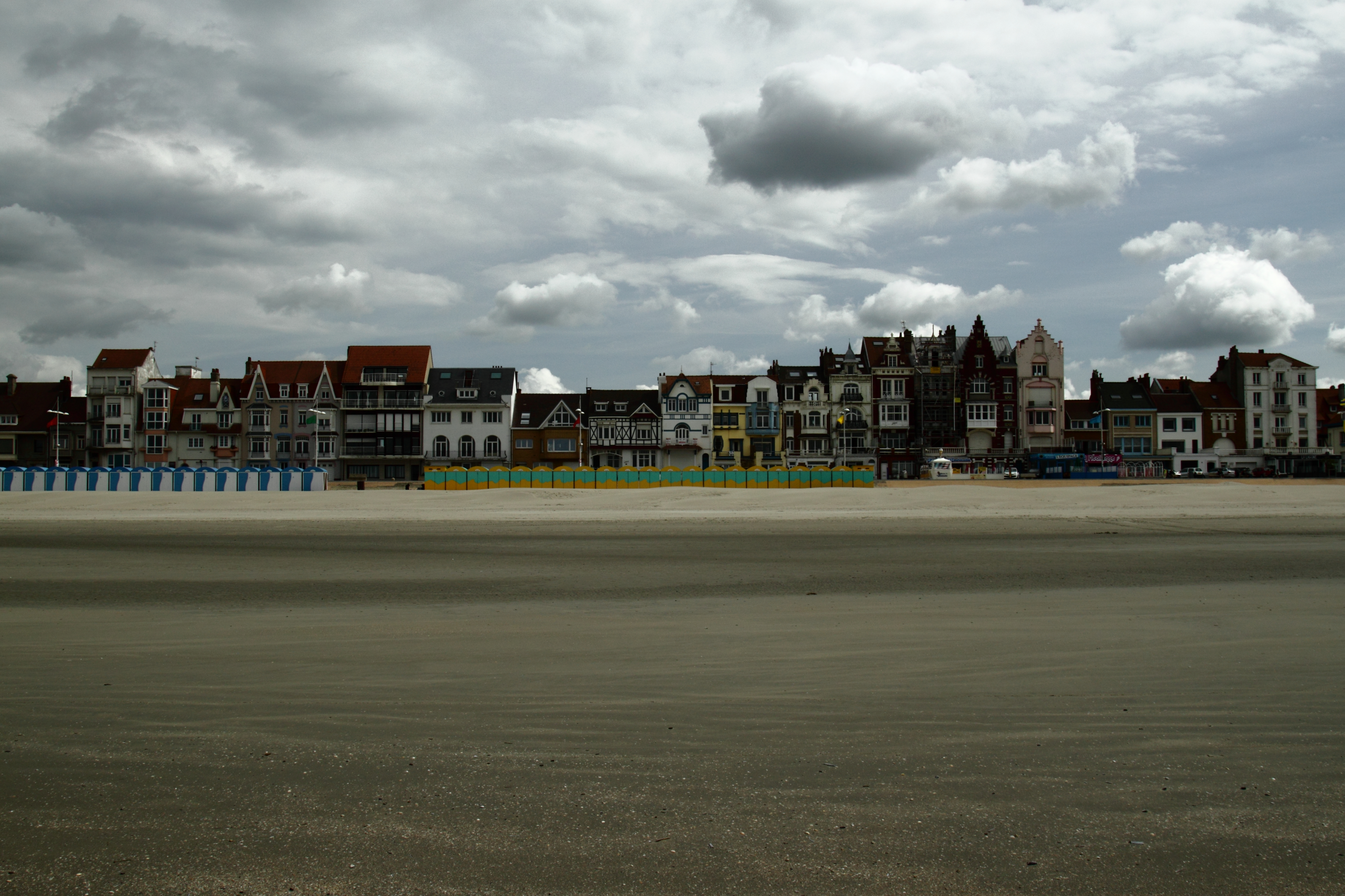 Malo-les-Bains (Malo aan zee1 en flamand occidental) est une ancienne commune du département du Nord, dans l'agglomération de Dunkerque. Elle a été détachée de la commune de Rosendaël en 1891 et fusionnée avec Dunkerque le 17 décembre 1969, dont elle constitue aujourd'hui l'un des quartiers, communément appelé « Malo » Malo-les-Bains compte plus de 16 000 habitants (16 182 en 1999), répartis sur une surface de 376 hectares. Malo-les-Bains est classée depuis le 14 novembre 1989 "Station balnéaire et Touristique"